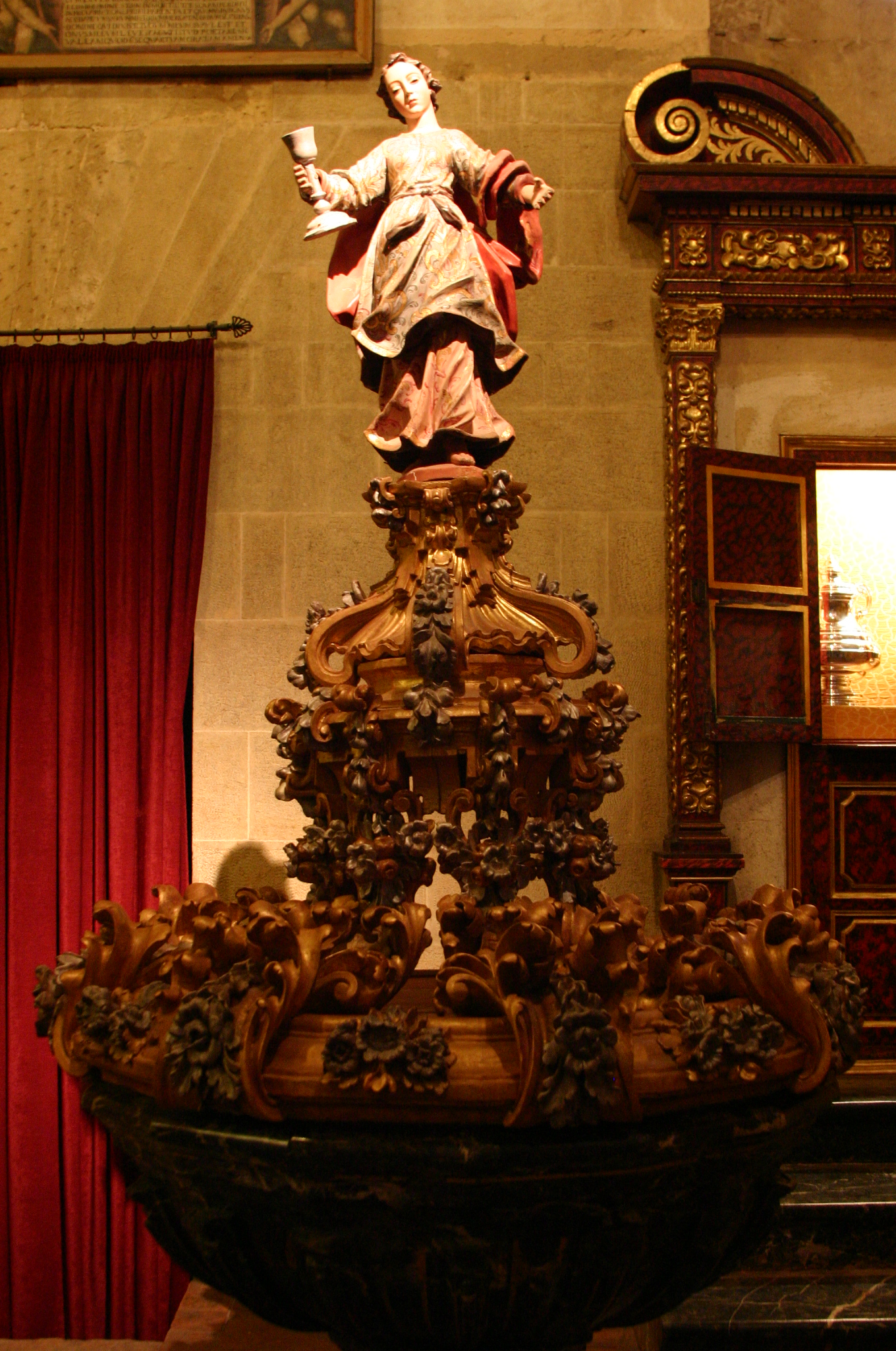 Santa Bárbara